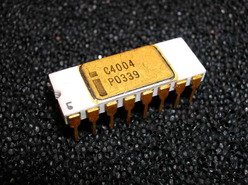 Intel C4004, weiße Keramik, Gold Platte